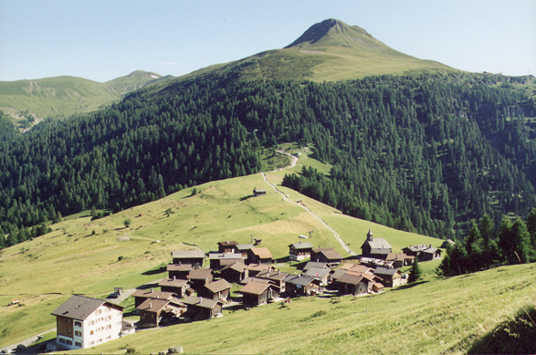 Obermutten